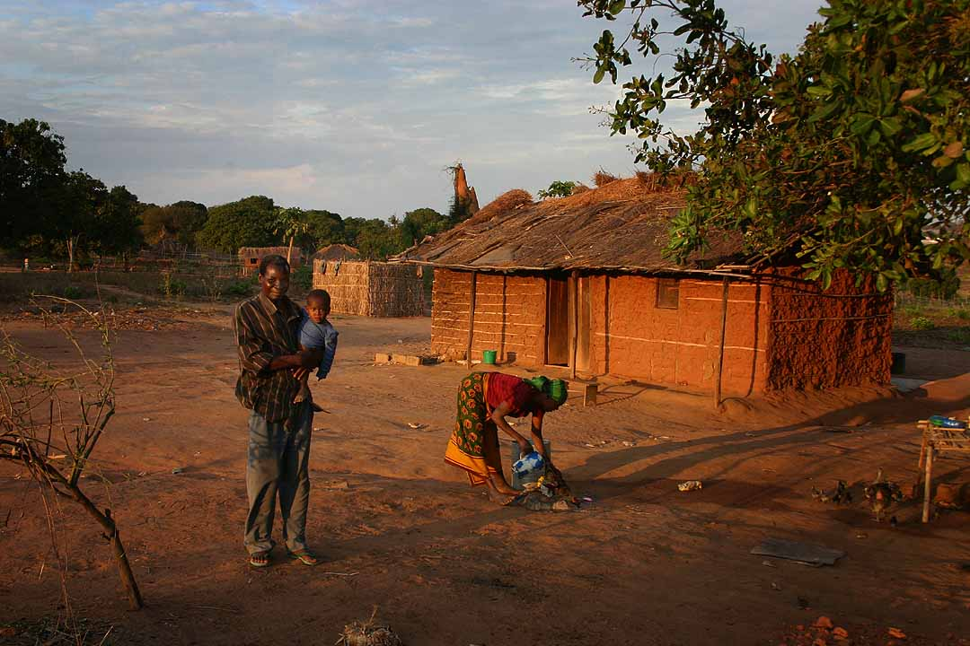 Makhuwa family in Nampula, MozambiqueMozambique